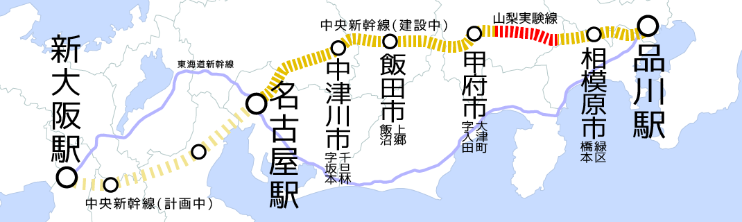 中央新幹線の路線図。 中央新幹線 JR東海の計画段階環境配慮書による。 中央新幹線 詳細未定。国土交通省の整備計画による。 山梨実験線 中央新幹線に転用される予定。